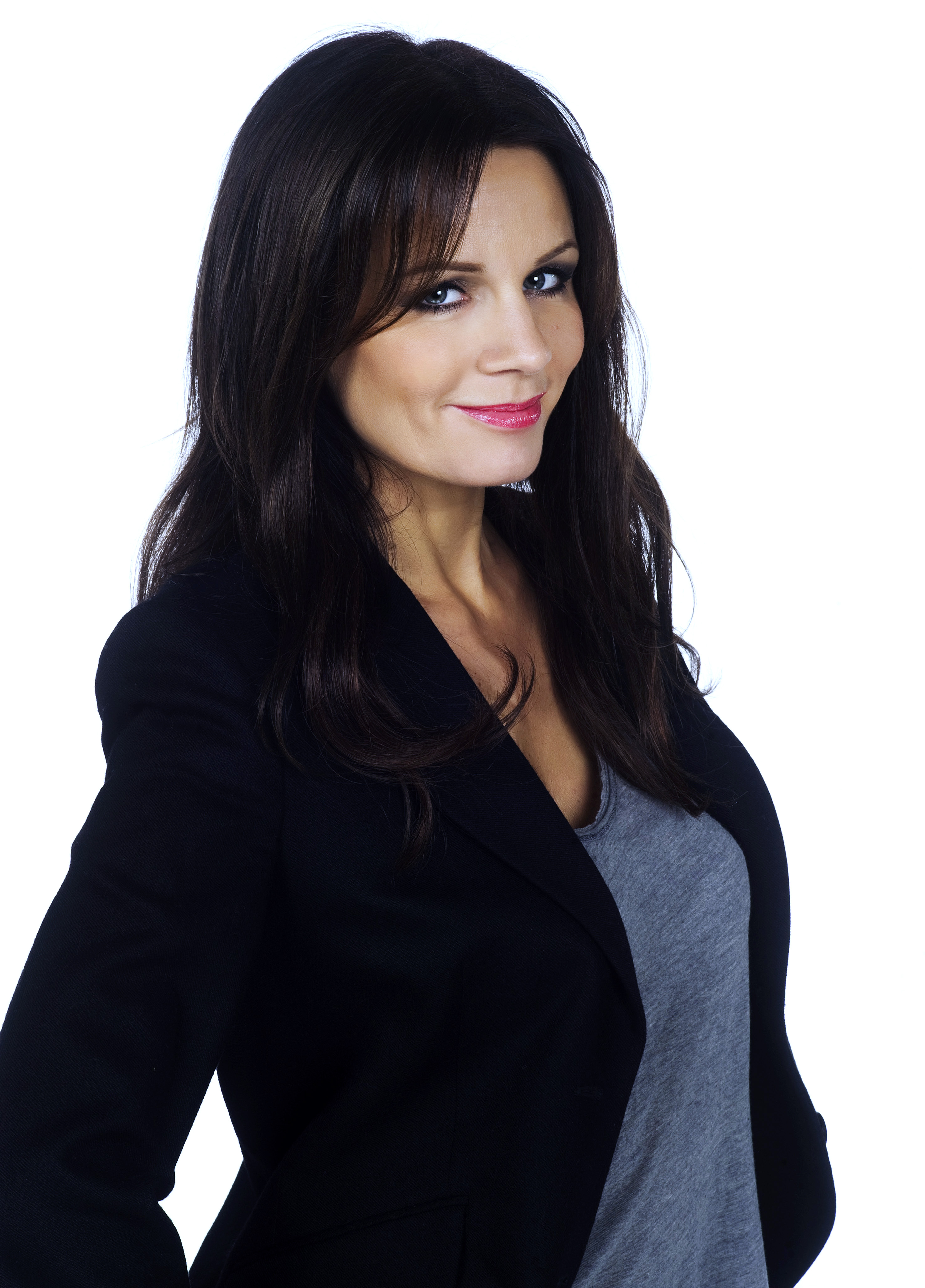 Artisten Lena Philipsson.